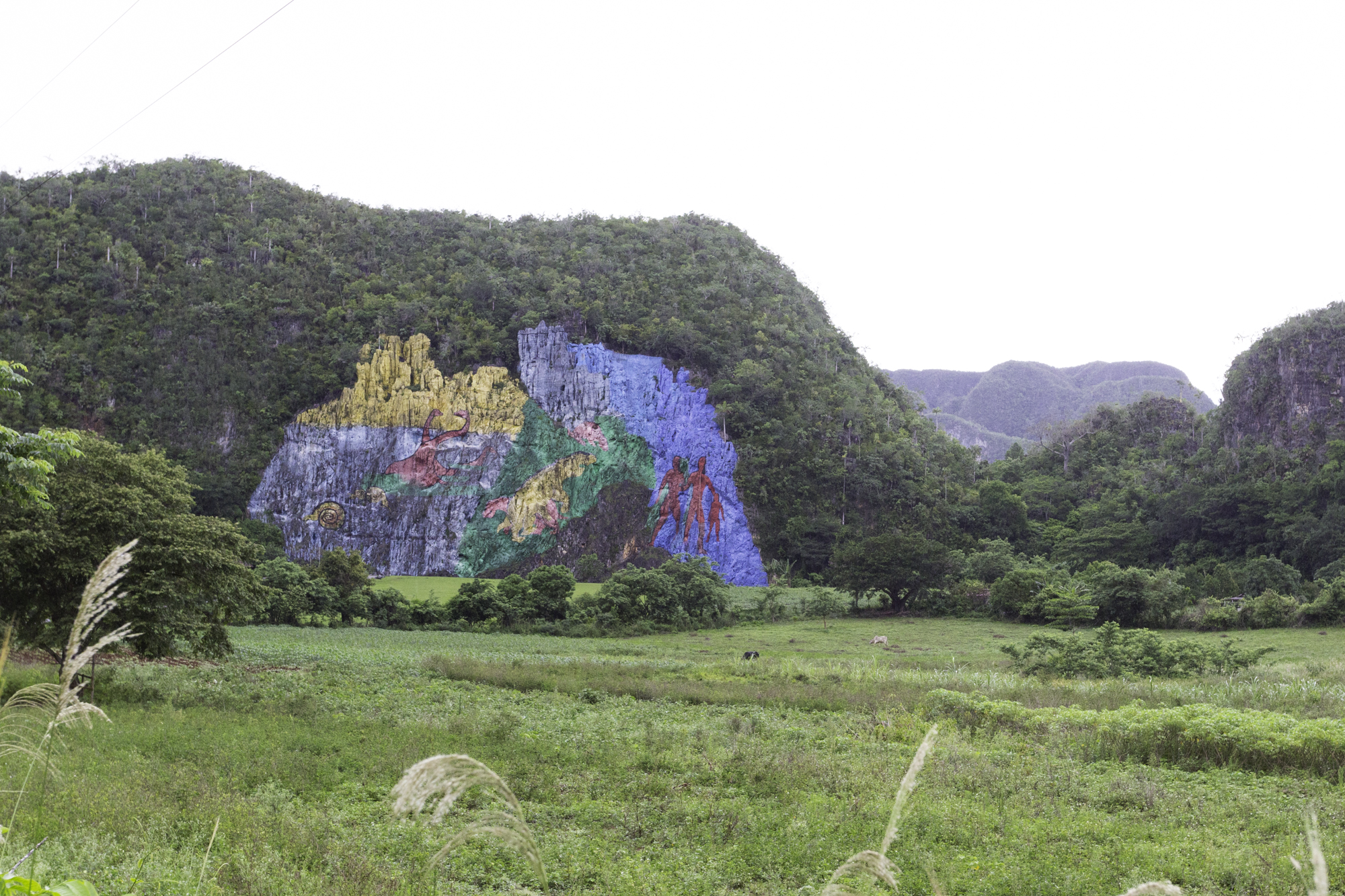 Murales della Preistoria in Cuba